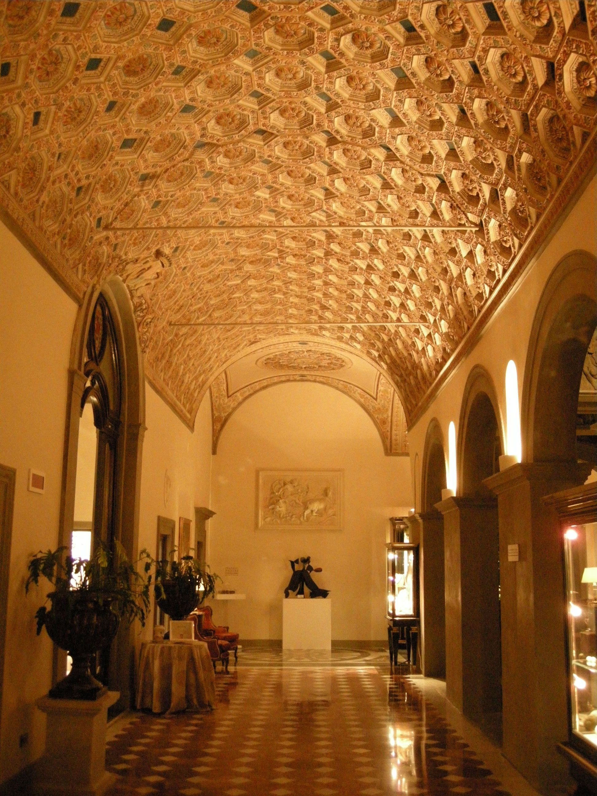 Cortile di giuliano da sangallo, passaggio con stucchi